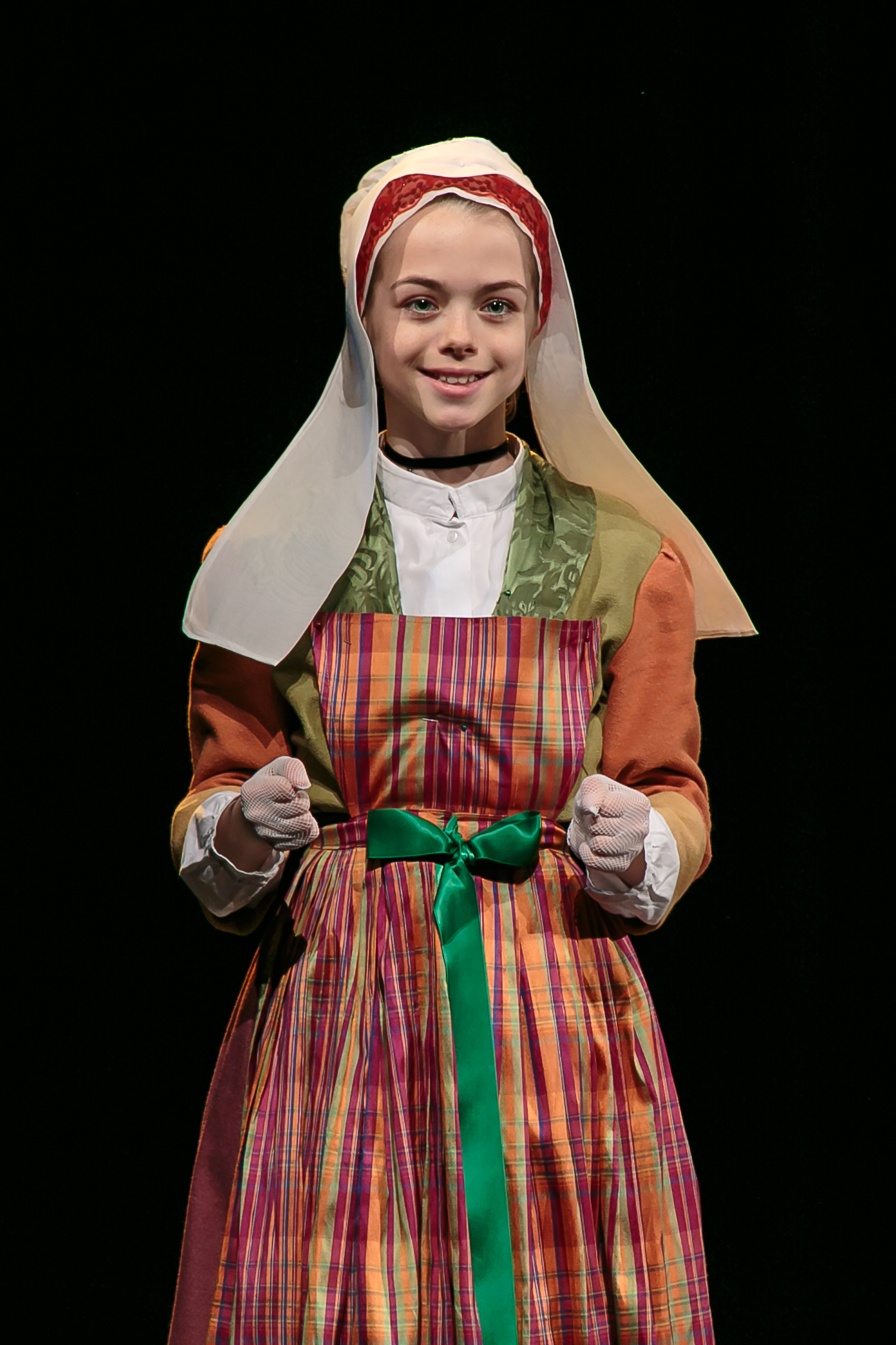 Spectacle de l'ensemble Bleuniadur Enfants (pays du Léon) pour les 21 ans du Bagad Bro An Aberioù à Plabennec, salle Tanguy Malmanche, le 16 avril 2016.